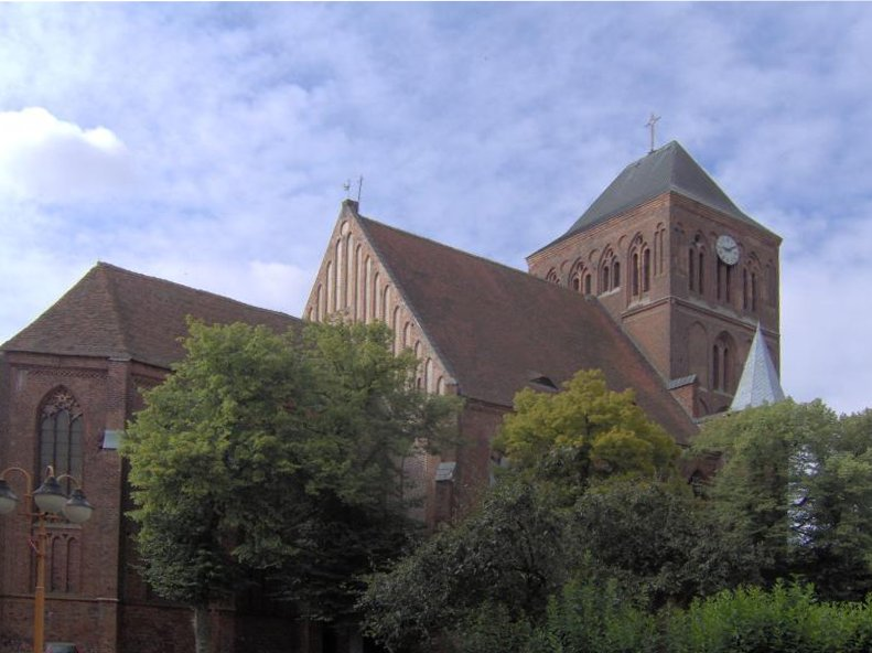 Kościół gotycki pw. Narodzenia NMP z XIV w. w Choszcznie, wybudowany przez joannitów